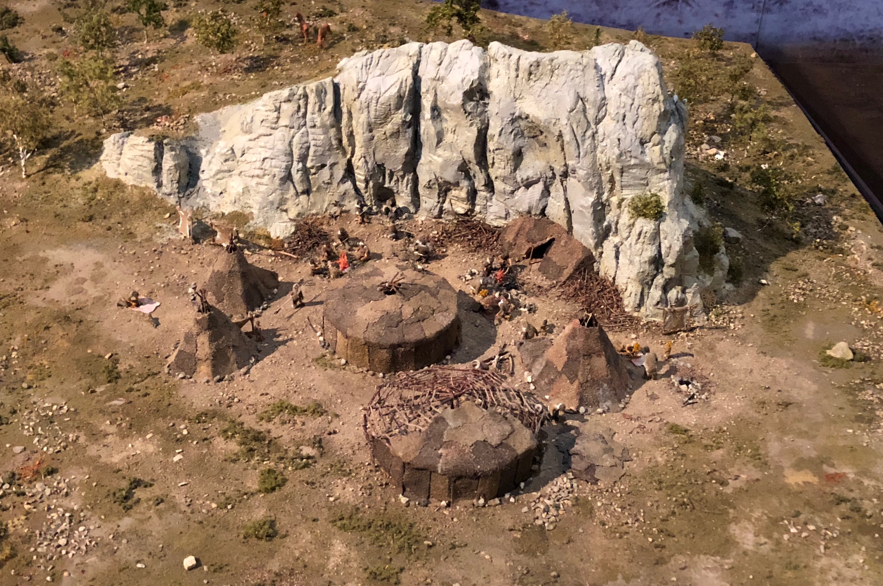 Modell eines prähistorischen Lagers in Schweizersbild